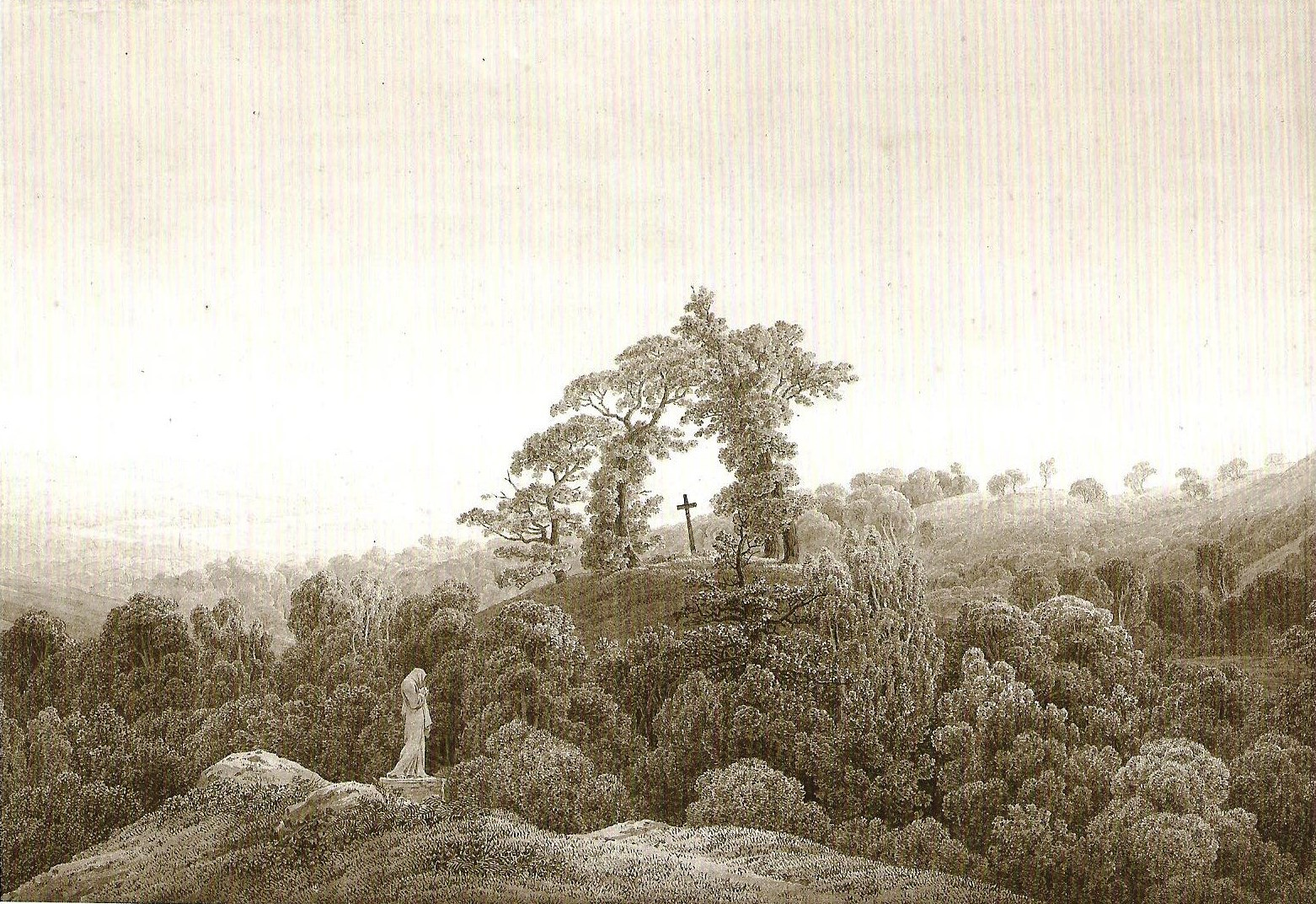 Das Kreuz an der Ostsee, um 1806/07, Sepia, 40,2 x 58 cm